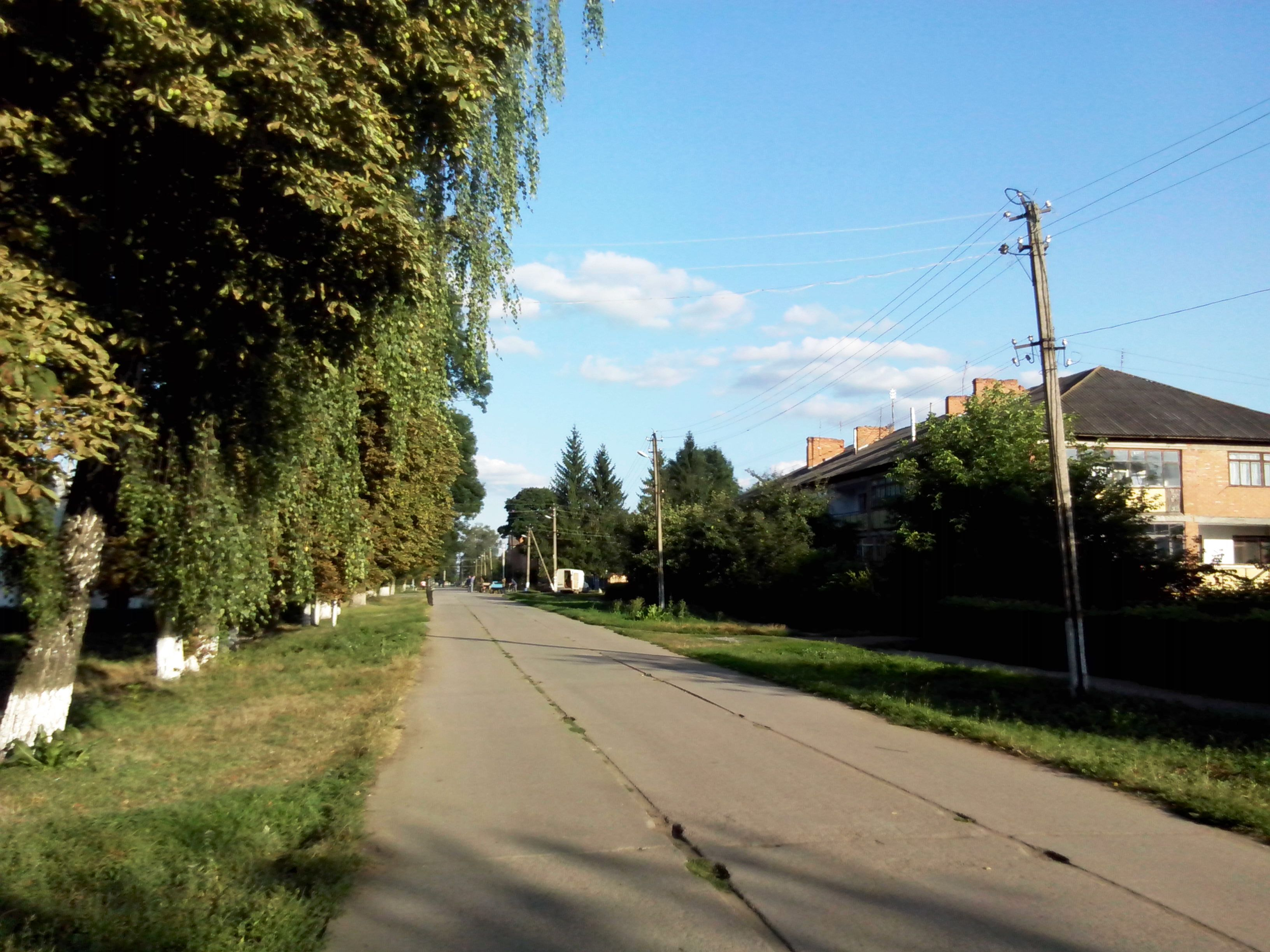 Головна вулиця; смт Лозове Деражнянського району Хмельницької області